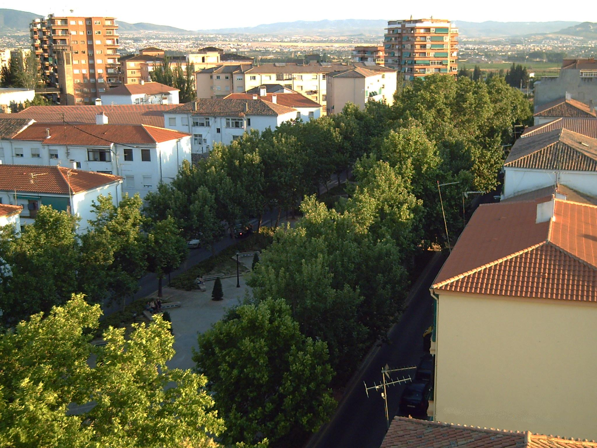 Circunvalación Encina, en el barrio de La Chana (Granada, España)